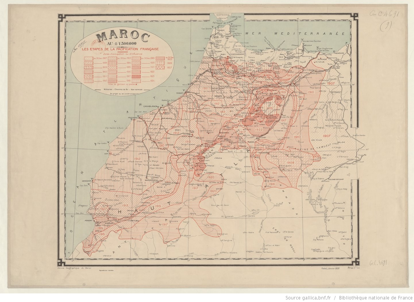 Pacification of Morocco (1907-1927) - Pacfication du maroc (1907-1927)